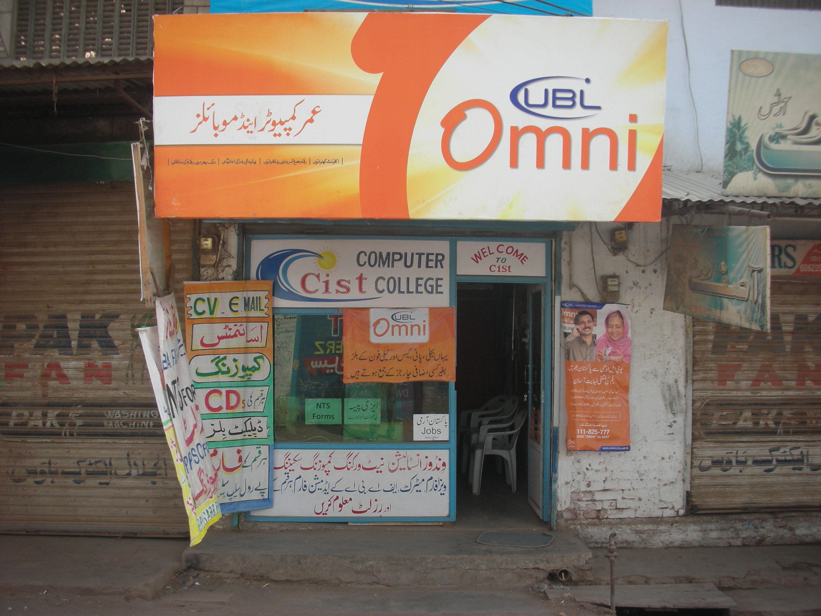 Bhalwal, Pakistan